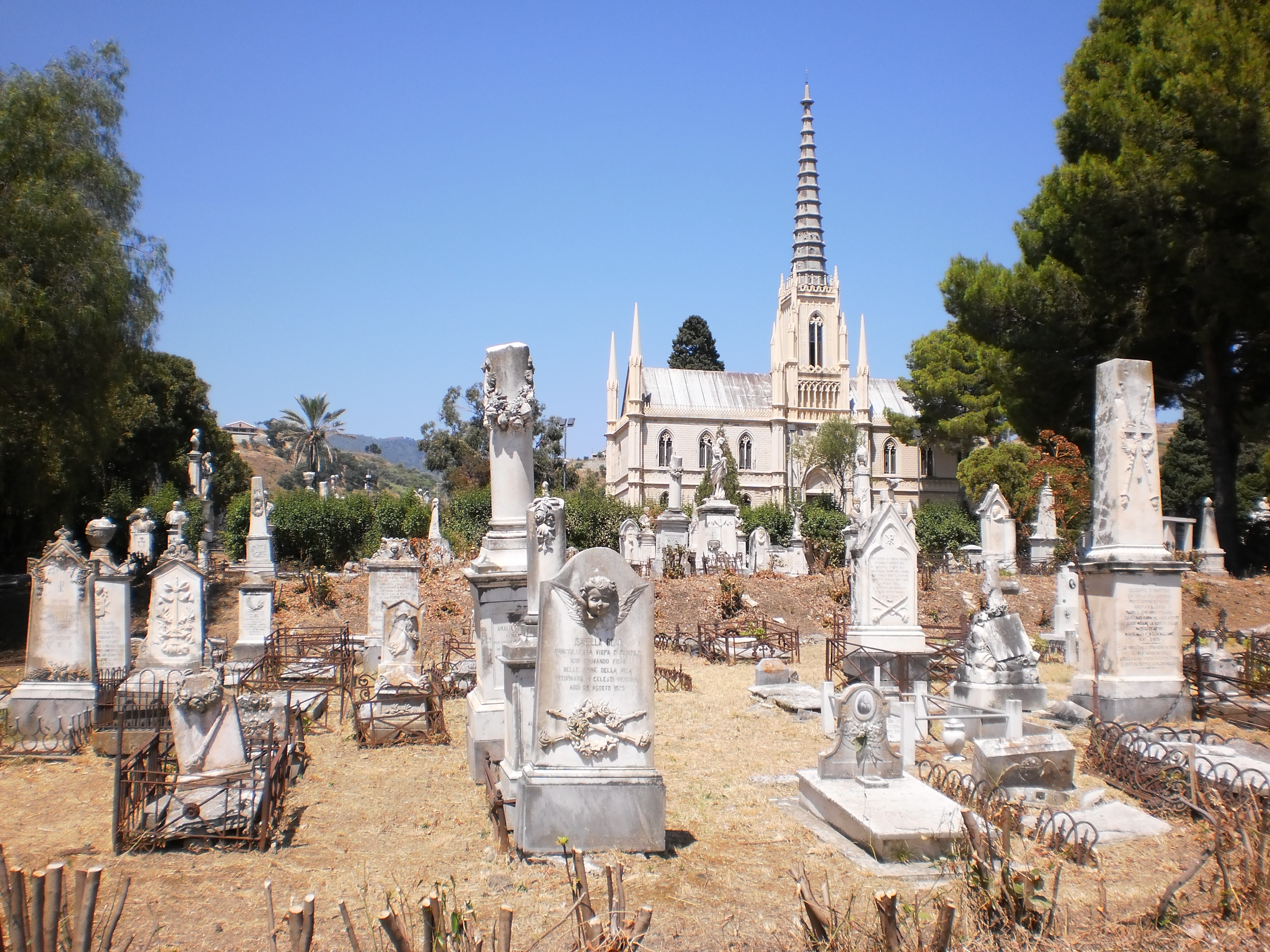 Antico Camposanto